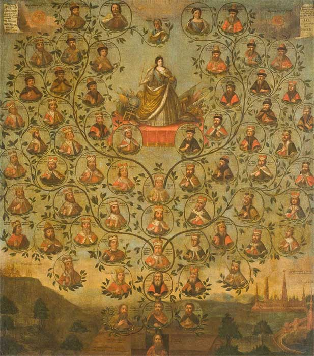 Родословное древо Русских царей. 1731. Худ. И.Никитин. Государственный Русский музей. Санкт-Петербург. Холст, масло. 158 х 145 Слева внизу авторская надпись с подписью и датой: Писано в 1731 году, а писал никитiнъ iванъ. Поступила: 1924 от А. И. Циммермана; ранее - собрание Ф. Ф. Юсупова (Москва)